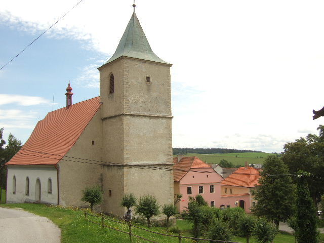 Horní Planá: Kirche der Hl. Margaretha (2009)